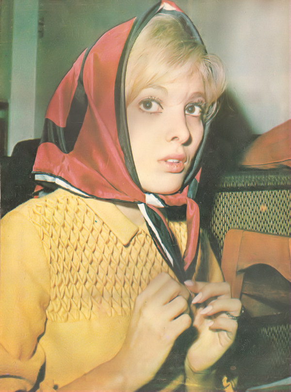 La actriz Silvina Rada.